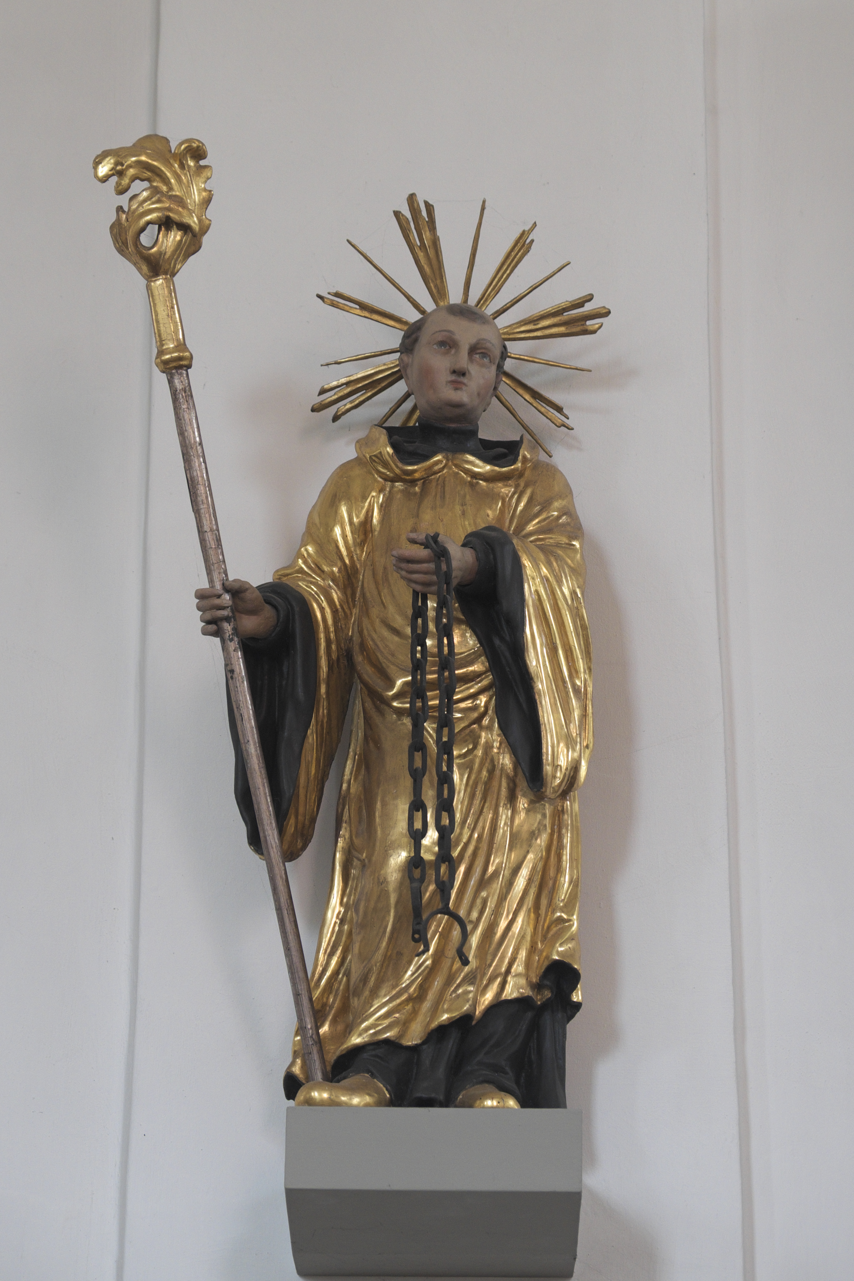 Katholische Pfarrkirche Sankt Emmeram in Geisenhausen (Schweitenkirchen) im oberbayerischen Landkreis Pfaffenhofen an der Ilm (Bayern/Deutschland), heiliger Leonhard